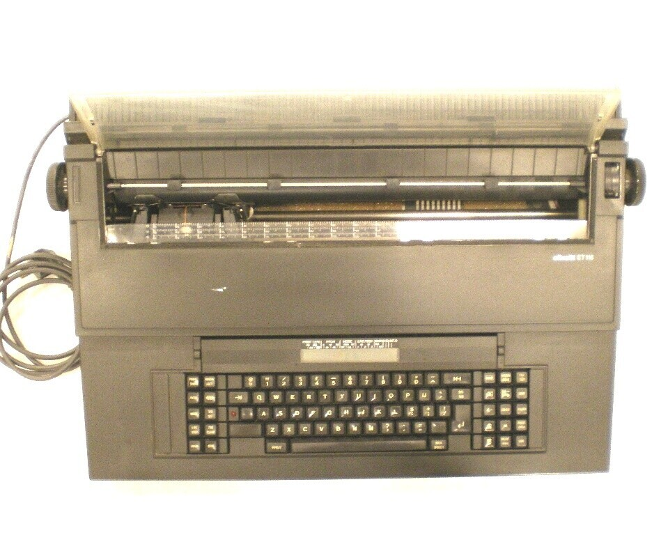 Macchina da scrivere elettronica a margherita Olivetti ET116. 220V, 50Hz., 75W